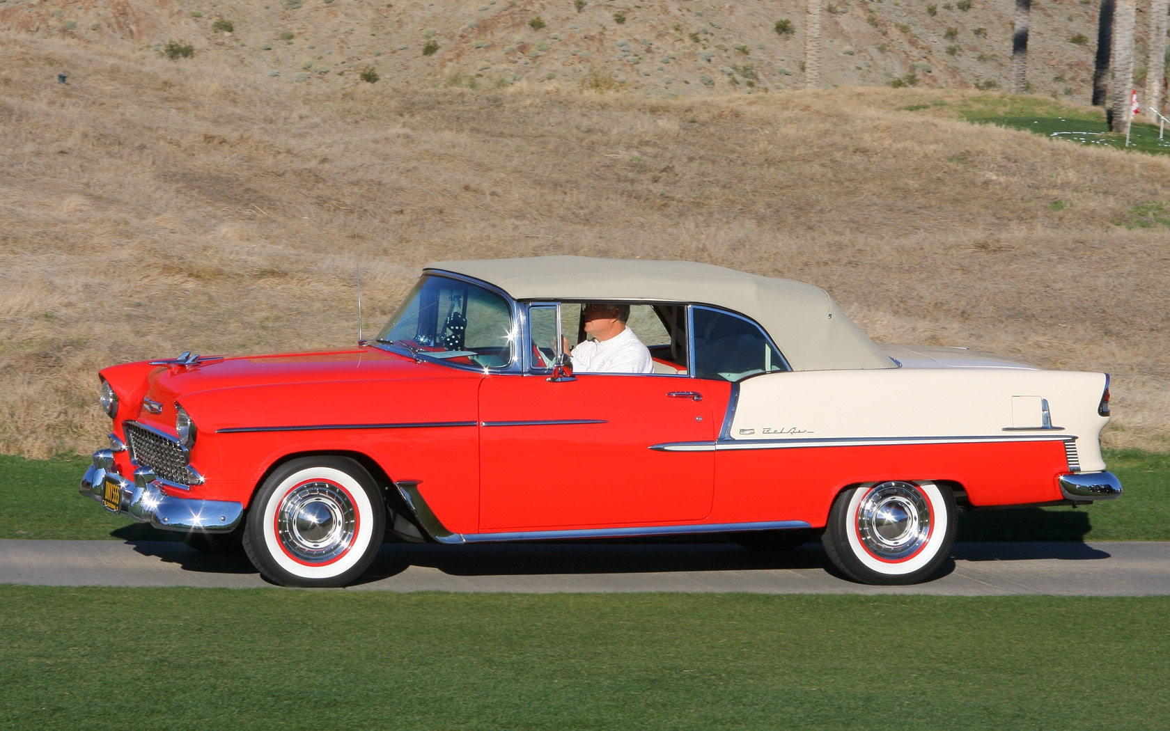 2011 Desert Classic, La Quinta, CA